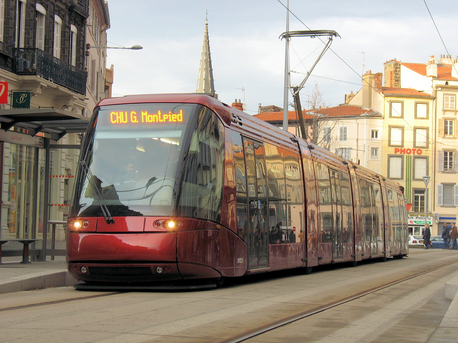 Tramway de Clermont-Ferrand, Place Avenue des Etats-Unis, Clermont-Ferrand, Puy-de-Dôme, France